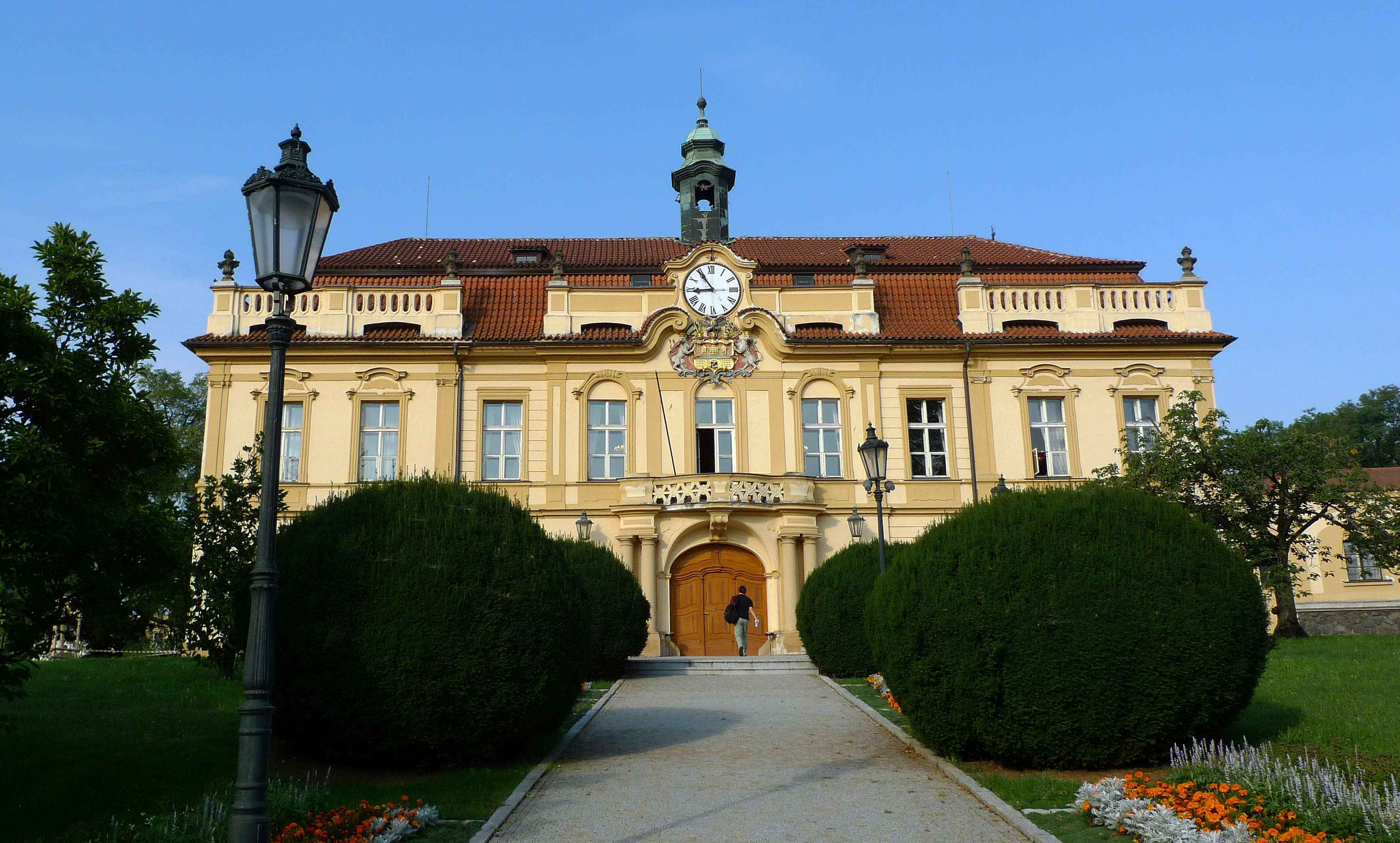 Libeňský zámek v srpnu 2013.